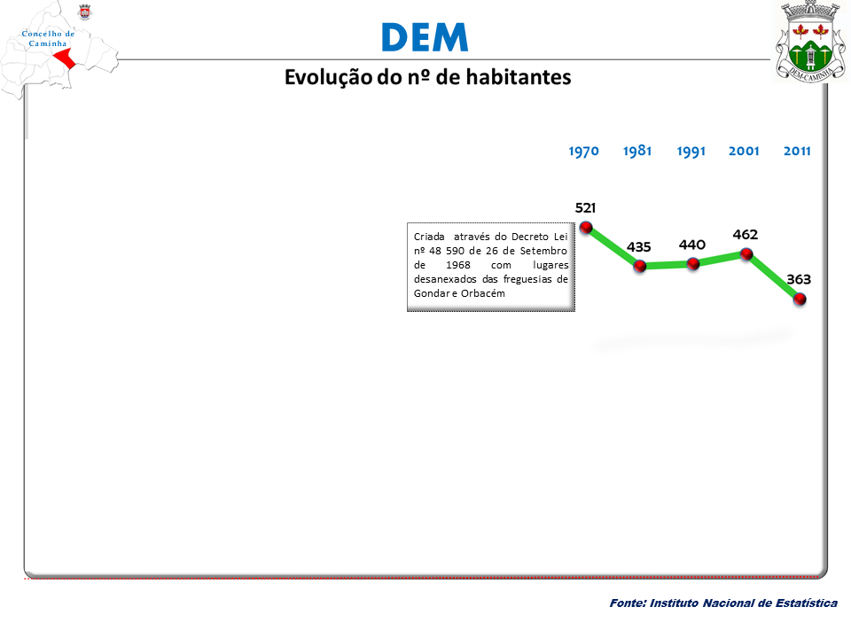 Censos 1864/2011